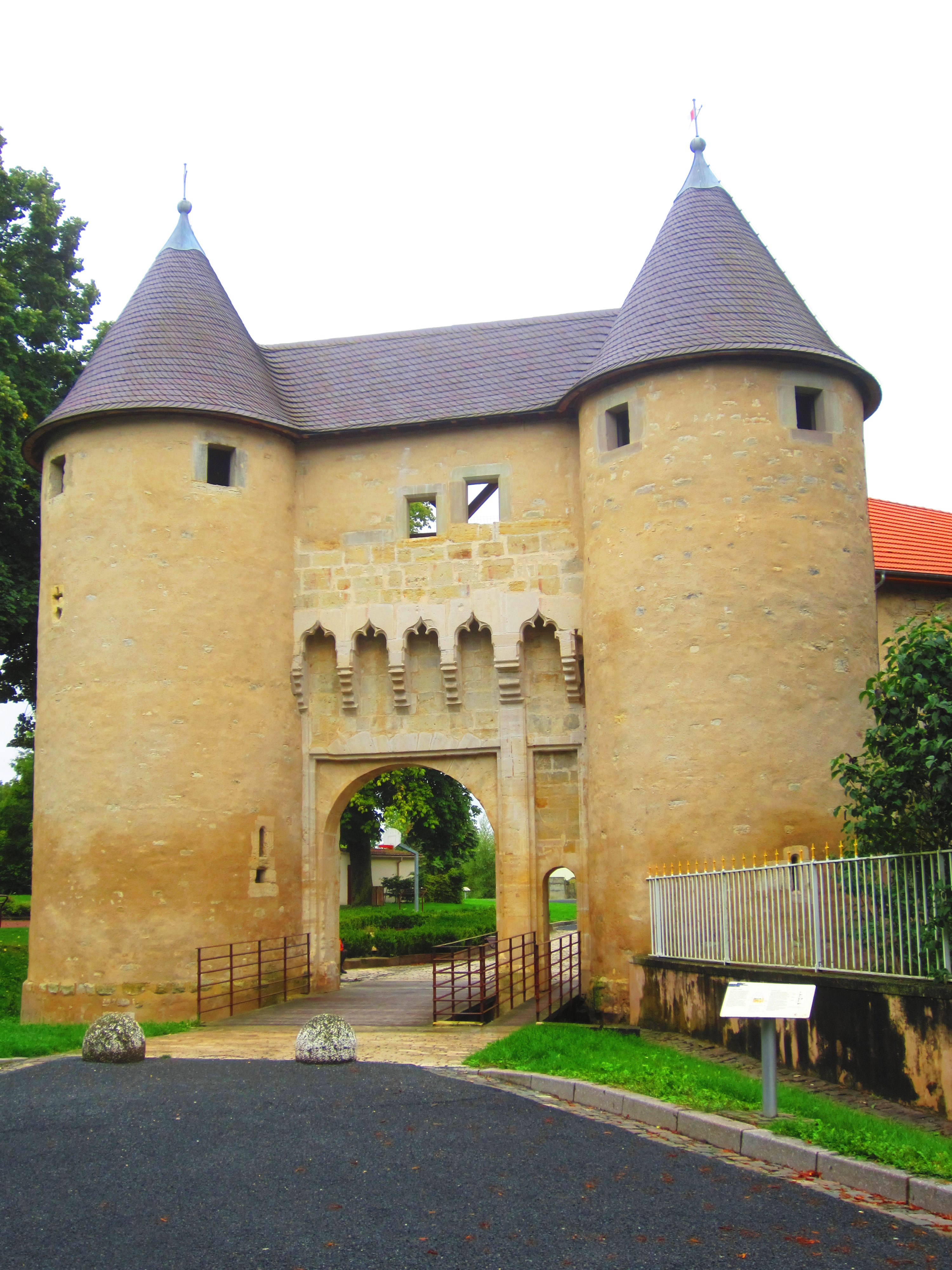 Chateau Vic Seille